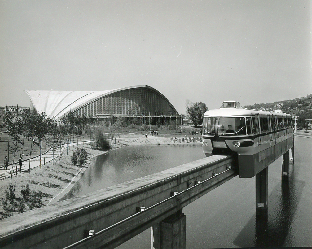 Torino, esposizione "Italia '61". La monorotaia e il Palazzo a Vela. Servizio fotografico : Torino, 1961 / Paolo Monti. - Fototipi: 7 : Positivo b/n, gelatina bromuro d'argento/ carta, provino a contatto da pellicola 10x12. - ((Serie costituita da 7 provini a contatto senza numerazione. La suddetta serie è contenuta nella scatola dei contatti identificata con il n. 147; sul coperchio iscrizione manoscritta a pennarello: "Contatti 7f.". - Occasione: Documentazione dell'esposizione internazionale Italia '61 tenutasi a Torino in occasione del centenario dell'unità d'Italia